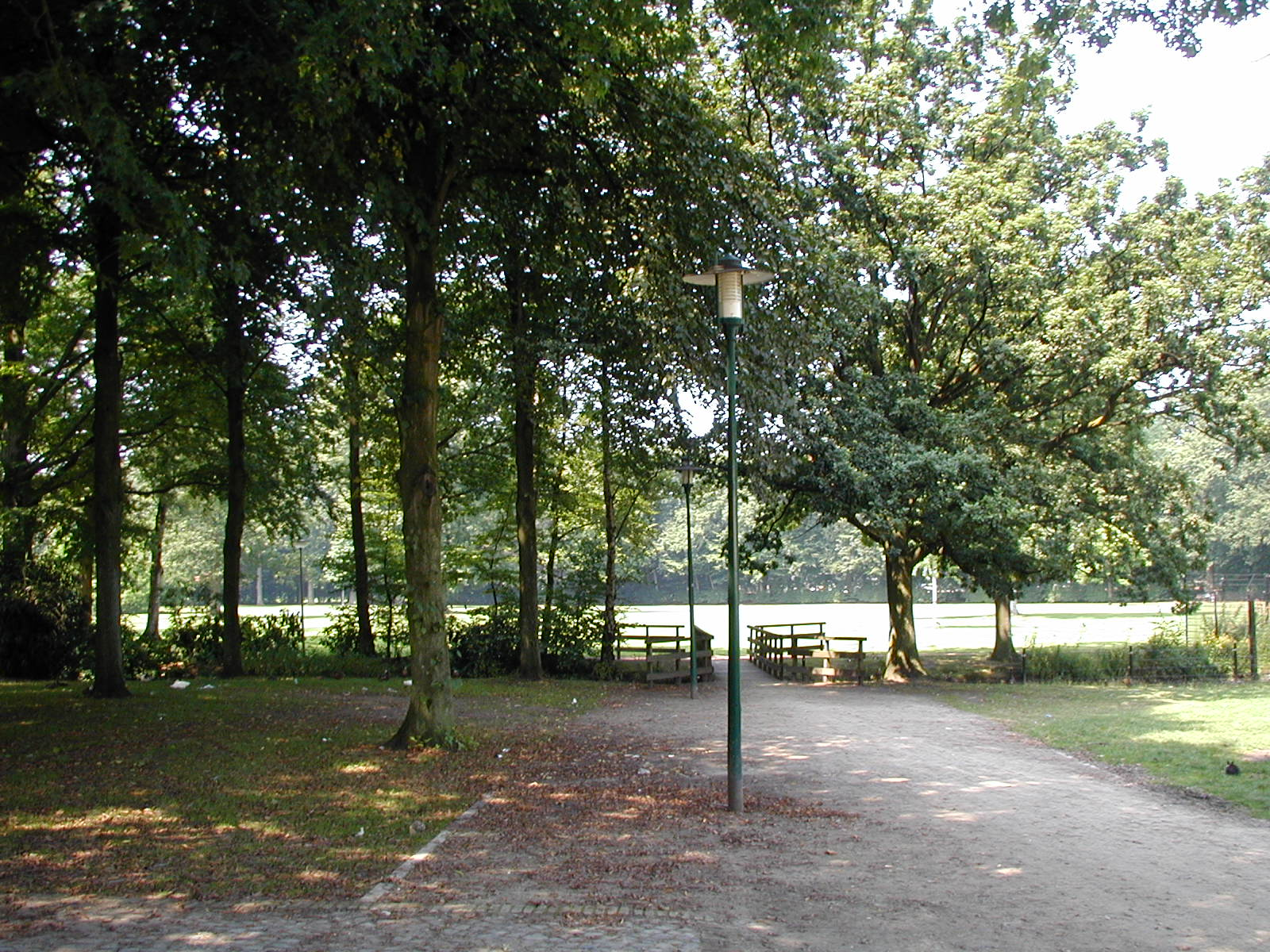 Tuin en park bij het Groot Kasteel te Deurne op 31 juli 2002. Foto zelf gemaakt.